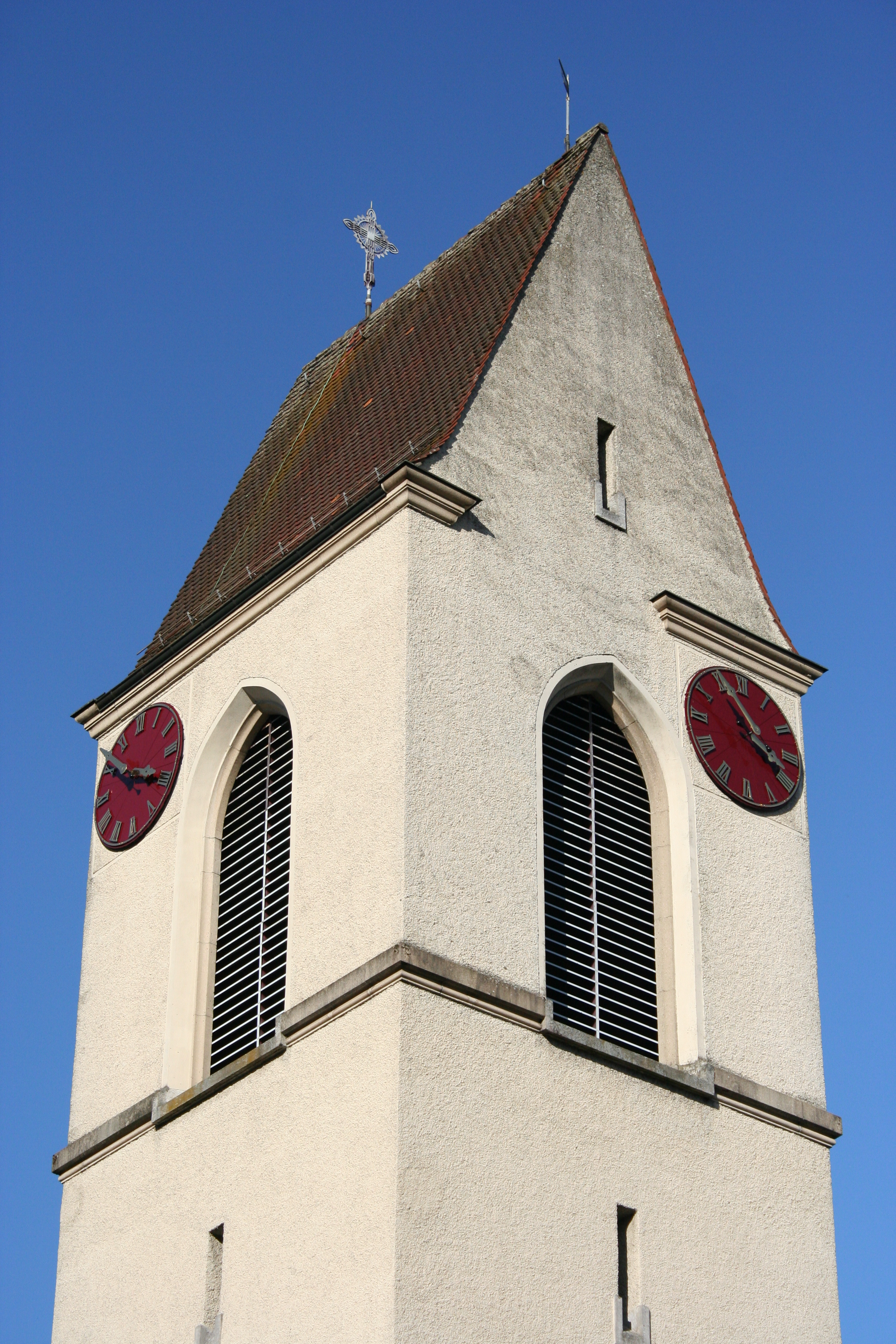 Römisch-katholische Pfarrkirche St. Josef Winterthur-Töss, Kirchturm von Südosten